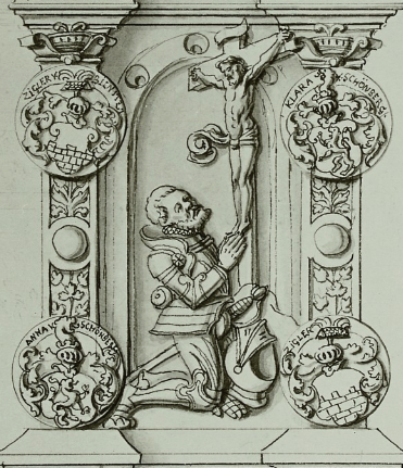 Caspar Ziegler († 27.04.1547) – Herre på Pillnitzslottet og far til alkymisten Anne Marie Ziegler